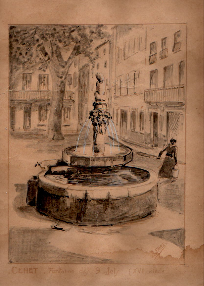 E. Erre. Fontaine des neuf jets, Ceret. aquarelle et gouache. Collection particulière. Vers 1935.